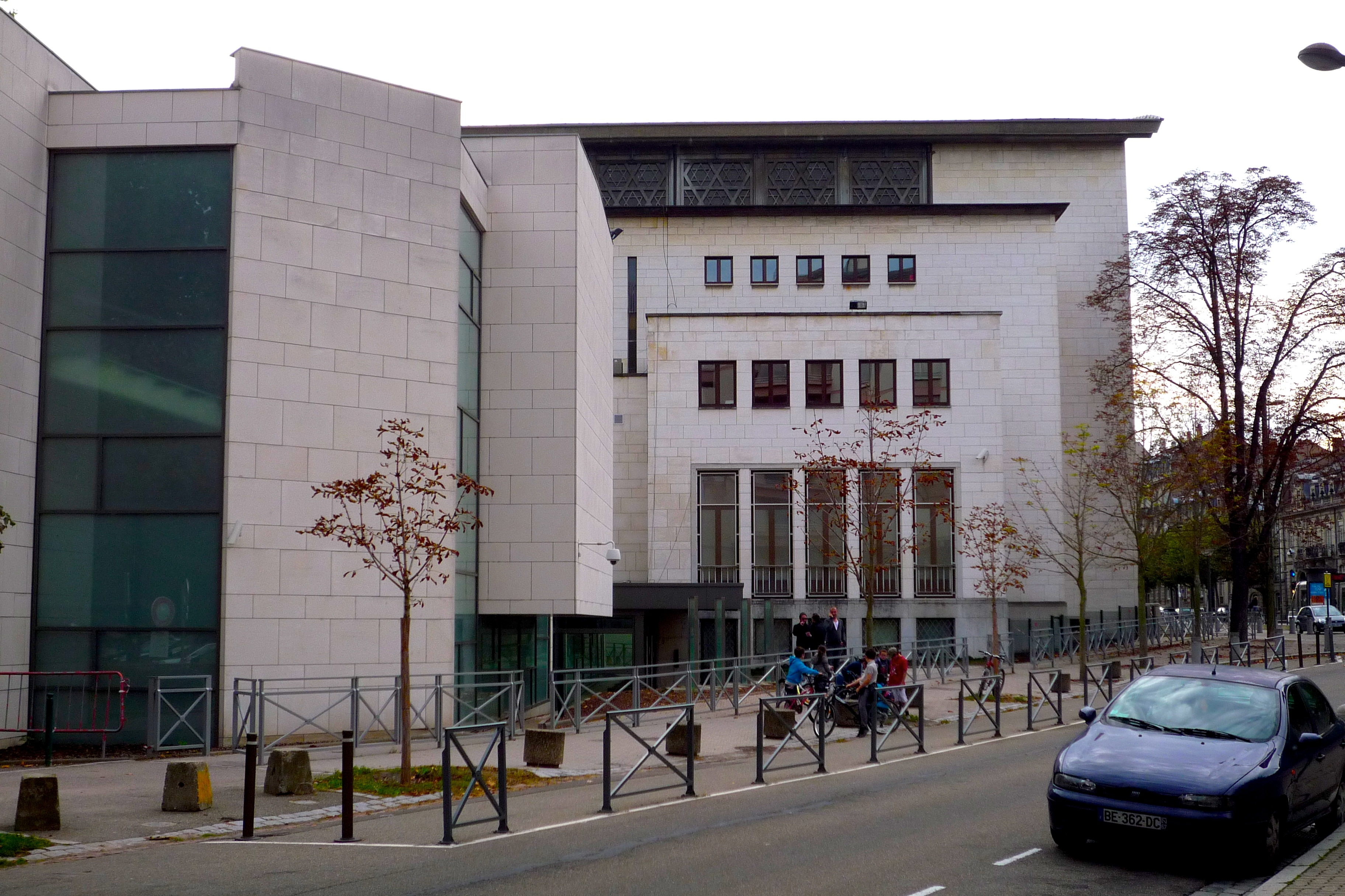 Strasbourg grande synagogue de la Paix, centre comunautaire. 2011